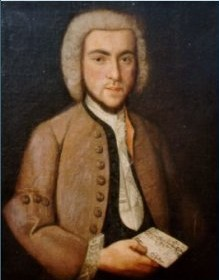 Elias Hayum (Öl auf Leinwand)